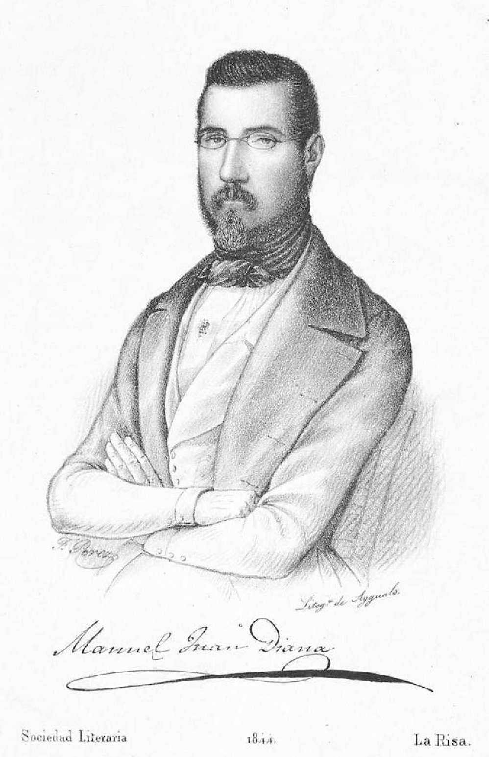 Manuel Juan Diana, litografía de Francisco Pérez para la Sociedad Literaria La Risa, 1844, litog. Ayguals, Madrid. Biblioteca Nacional de España